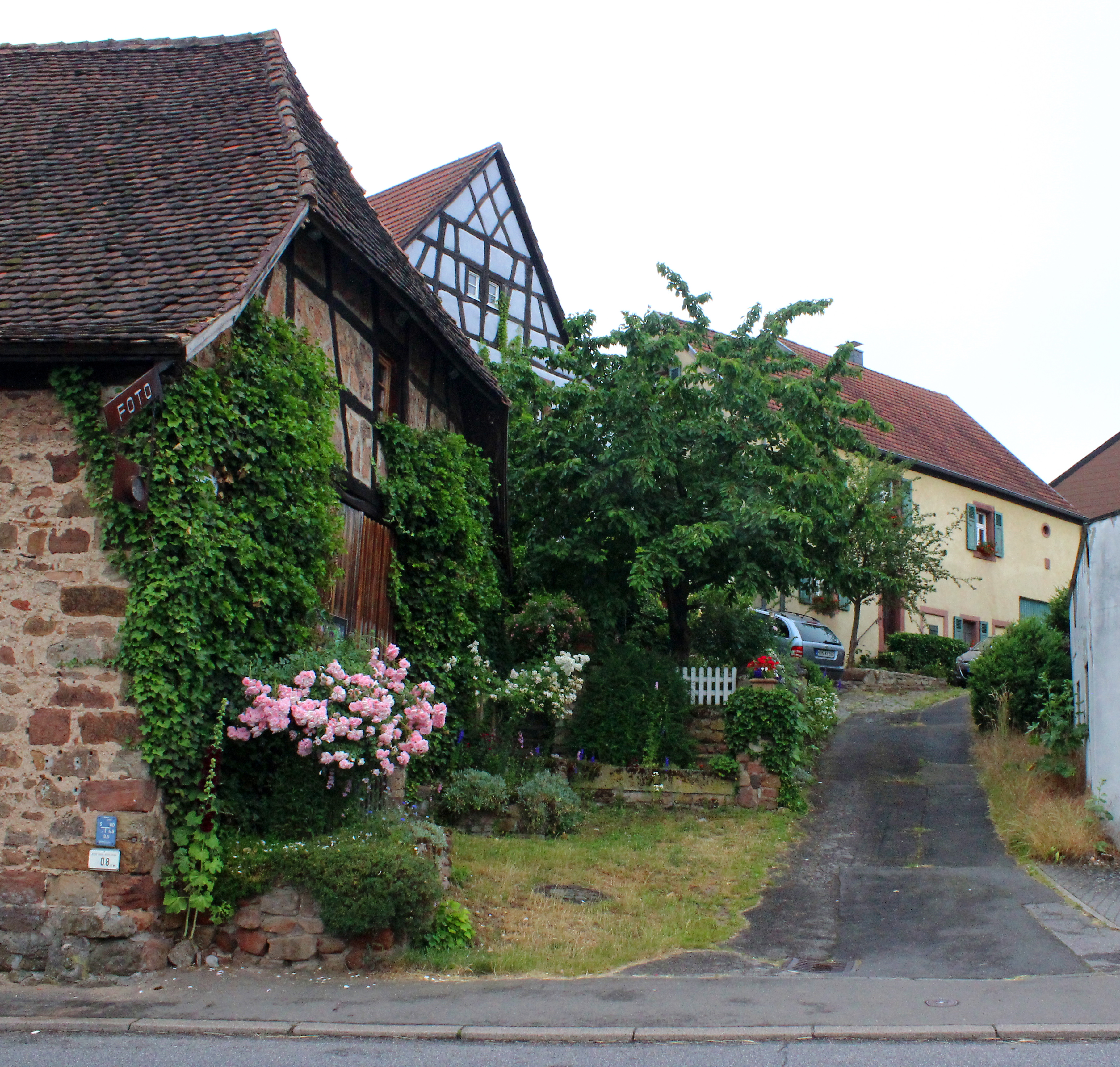 Häuser in Ingweiler, einem Ortsteil von Einöd, Stadt Homburg, Saarpfalz-Kreis, Saarland